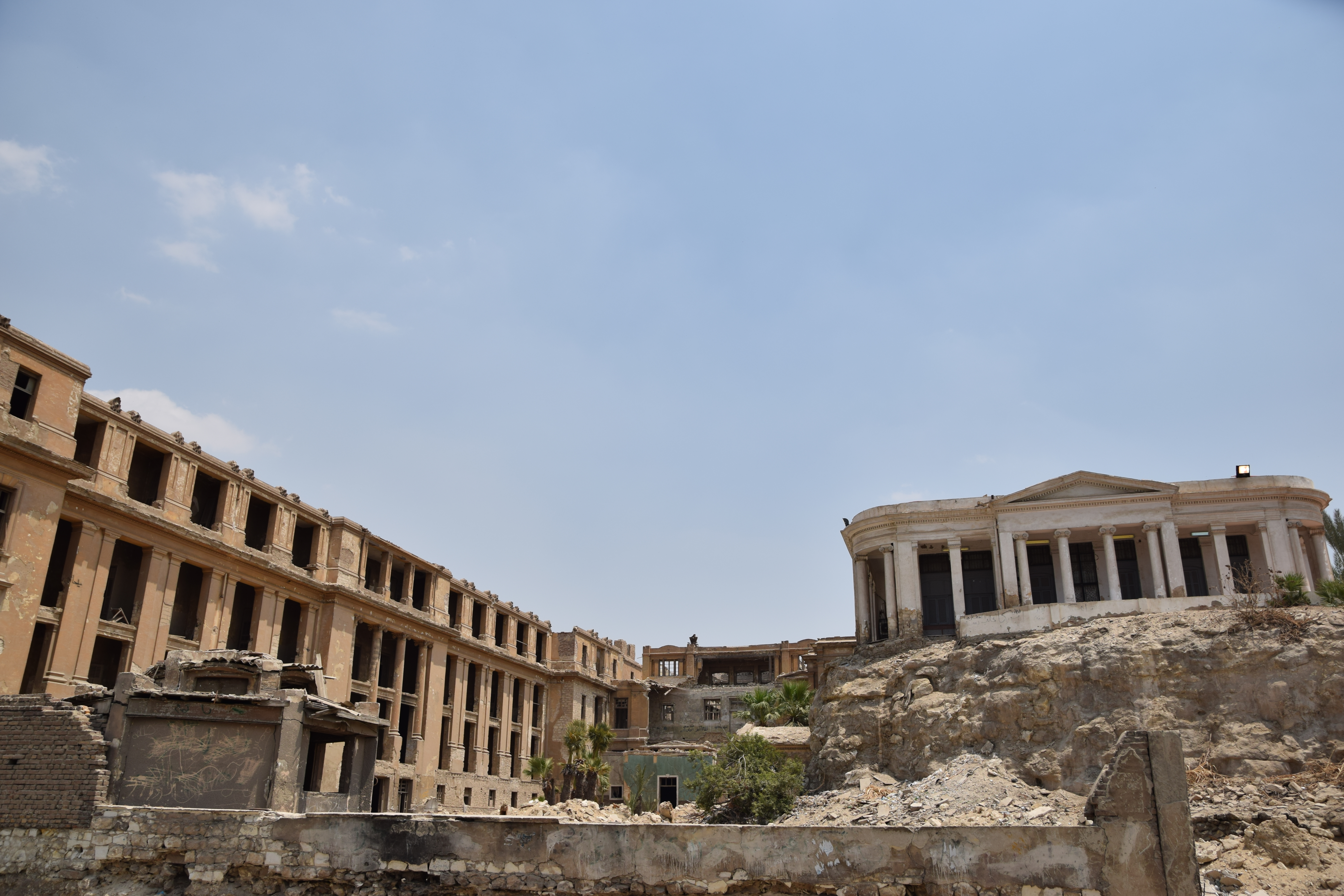 قصر "عين الحياة" .. شاهد على العصر و سبحان مغير الأحوال من حال الى حال !!! عندما تذهب الى "حلوان" و تقع عيناك على ذلك القصر ، ستستحضر القصور الانجليزية القديمة في روايات "وليم شكسبير" و ذلك لطرازه و تصميمه الاوروبي الرفيع .كان قصرا منيفا و تحفة معمارية رائعة لكنه أصبح اطلالا ، مهجورا تسكنه خفافيش الظلام !! .. انه قصر "عين الحياة" و المشهو بقصر "الخديو توفيق" .... بني الخديو توفيق قصر "عين الحياة" عام 1888م علي مساحة 24 فدانا، ويتكون القصر من 4 طوابق وقيل إنه يحتوي علي عدد غرف بعدد أيام السنة، تحيط به مساحات واسعة من الحدائق والمتنزهات ،كما كان يوجد به سرداب تحت الأرض يصل "لركن توفيق". لكن تم هدمه لتقوية ركائز القصر . سمي قصر الخديو توفيق بقصر "عين الحياة " نسبة للأميرة عين الحياة كريمة الأمير أحمد رفعت باشا و زوجة السلطان حسين كامل الذي حكم مصر مع بداية القرن الماضي حيث أقامت به فترة من الزمن، كذلك أقام فيه الخديو توفيق حيث إعتاد علي الإقامة فيه لعدة فترات محدودة من السنة ، خاصة بعد أن تعرض قصر عابدين لبعض الحرائق فنقل إجتماعاته الحكومية بقصر حلوان حتي توفي فيه عام 1892م . ويعتبر القصر تحفة معمارية رائعة ، كما كان مزارا سياحيا يزوره العديد من السياح من كل مكان للإستمتاع بطقس حلوان خاصة في الشتاء وكذلك للإستشفاء والإستجمام في الحمامات الكبريتية . وقديما استخدم القصر كفندق أطلق علية " فندق الحياة"، كذلك أصبح مبني إستراحة القصر مقر إداريا لمستشفي حلوان العام. كما تم تصوير العديد من الاغاني والافلام في ذلك القصر العريق مثل فيلم "كده رضا" و "كامب" .